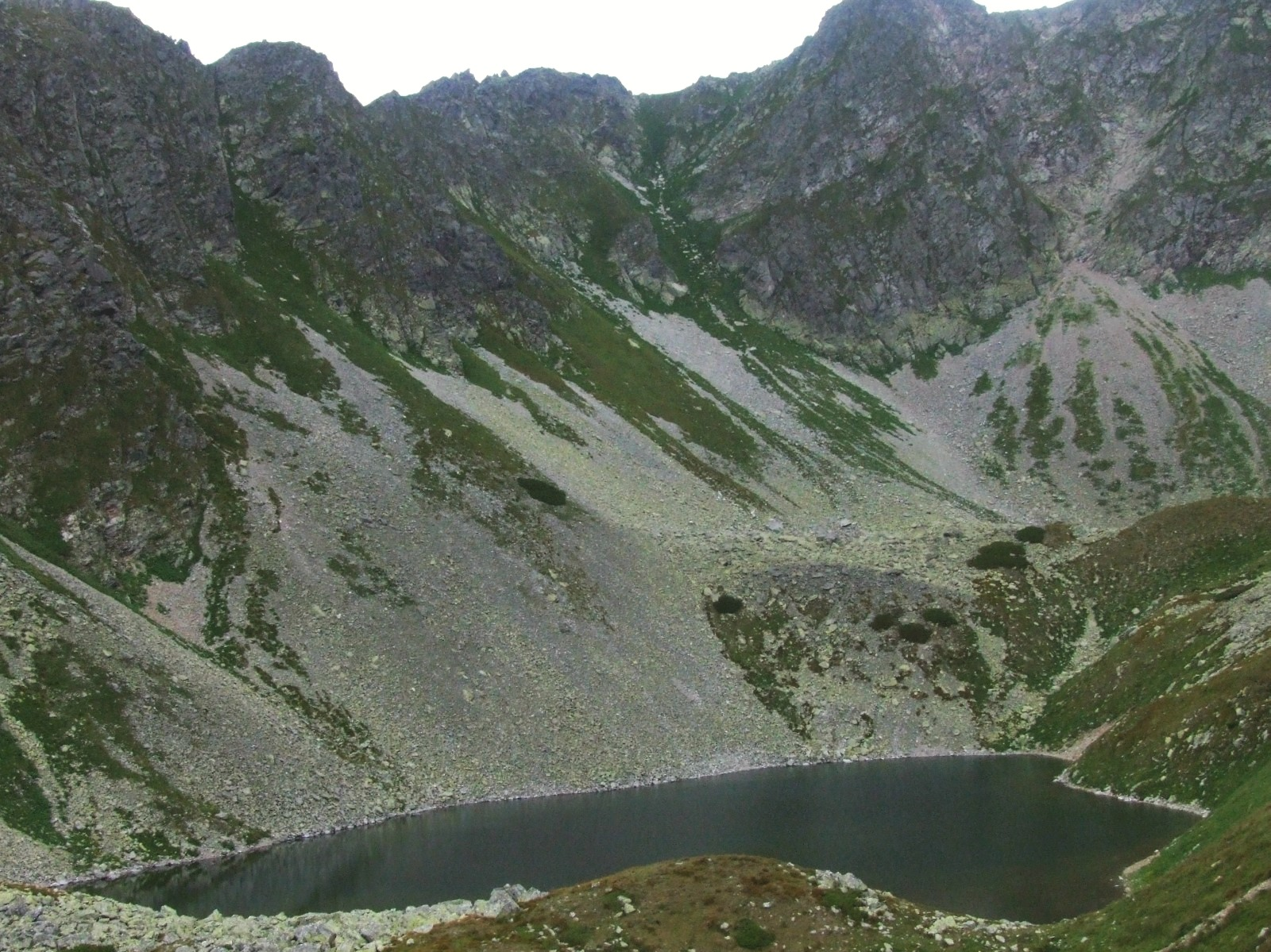 Wielki Staw Bystry